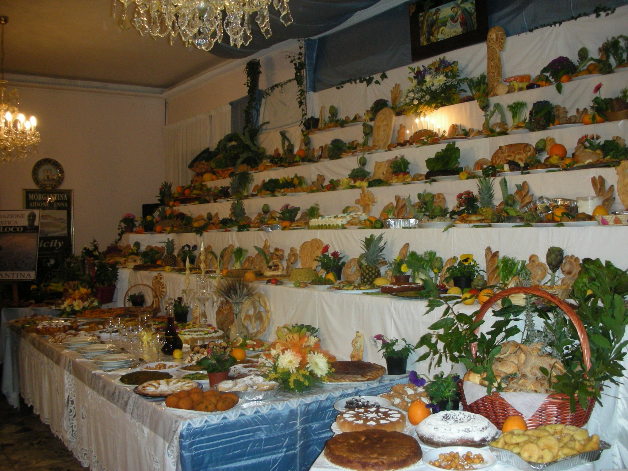 Aidone EN_Sicilia: tavolata di San Giuseppe alla ProLoco (2008)